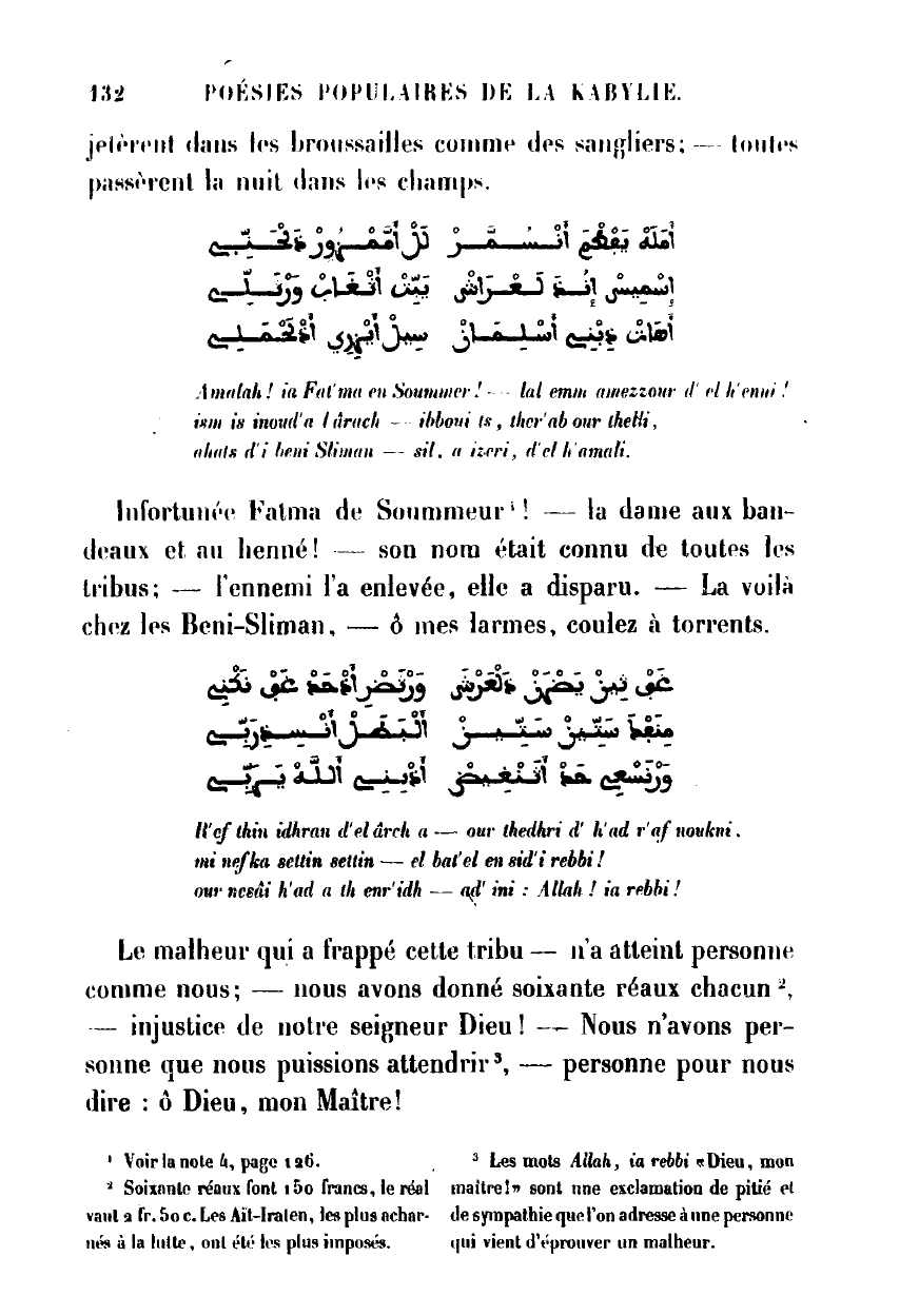 A page from Adolphe Hanoteau, Poésies populaires de la Kabylie du Jurjura, Paris 1867